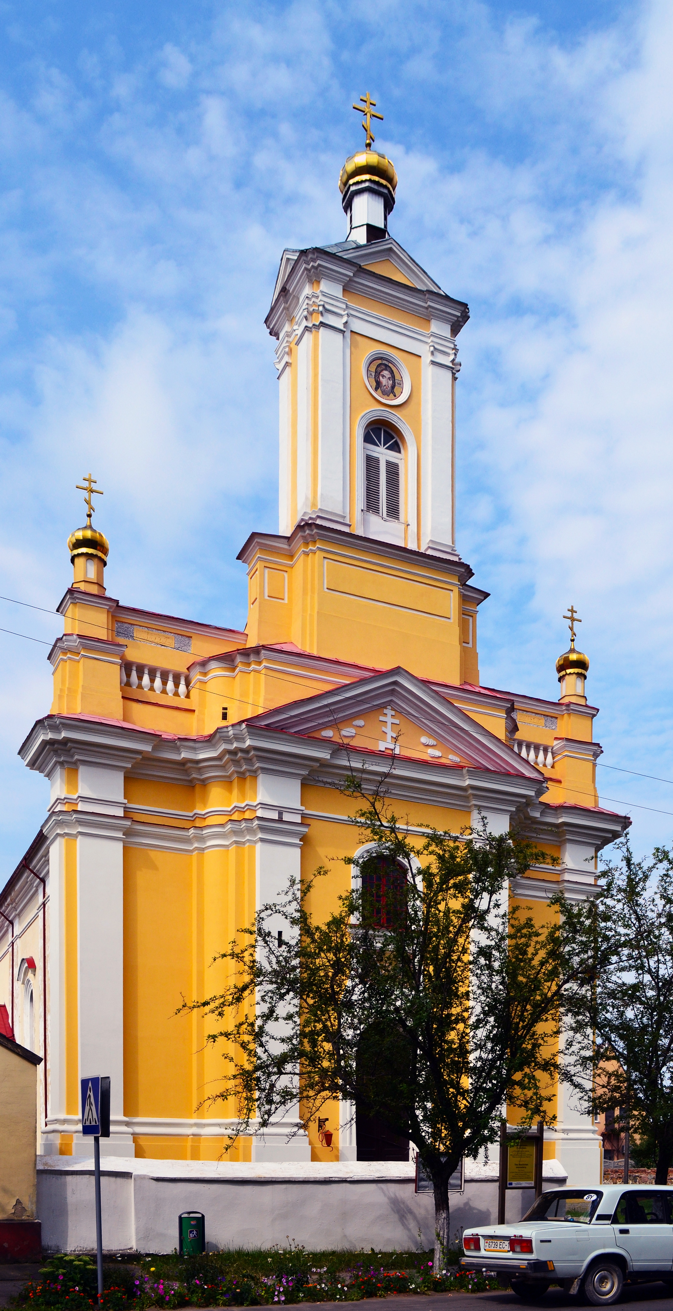 Беларуская (тарашкевіца): Петрапаўлаўская царква (Ружаны) This is a photo of Belarusian heritage monument. Reference number: 112Г000643 ( WLM)